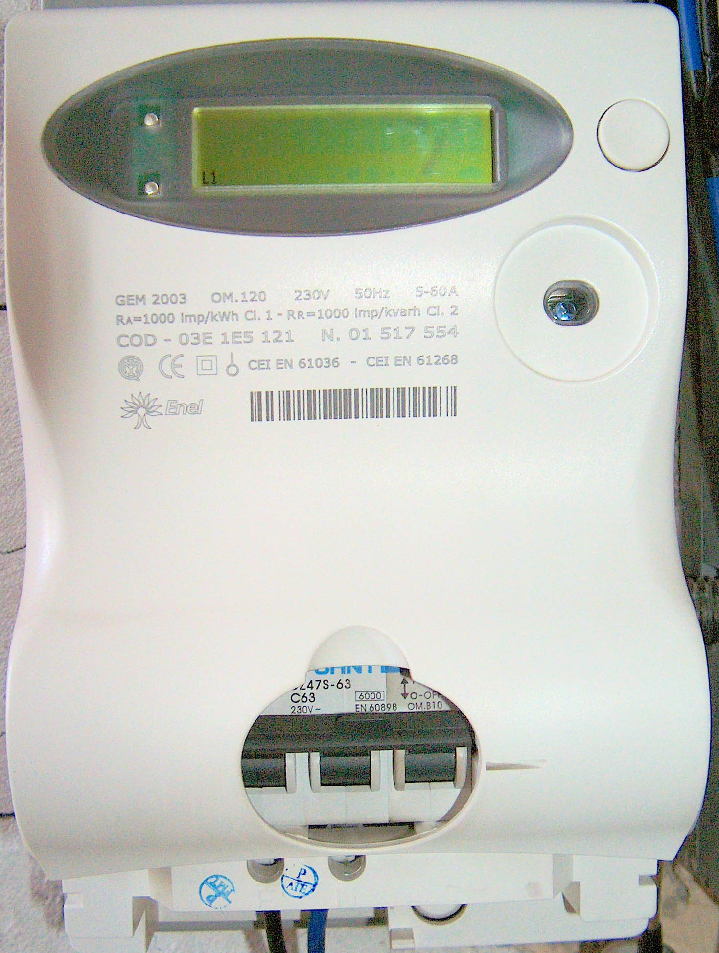 contatore elettronico dell'ENEL, monofase